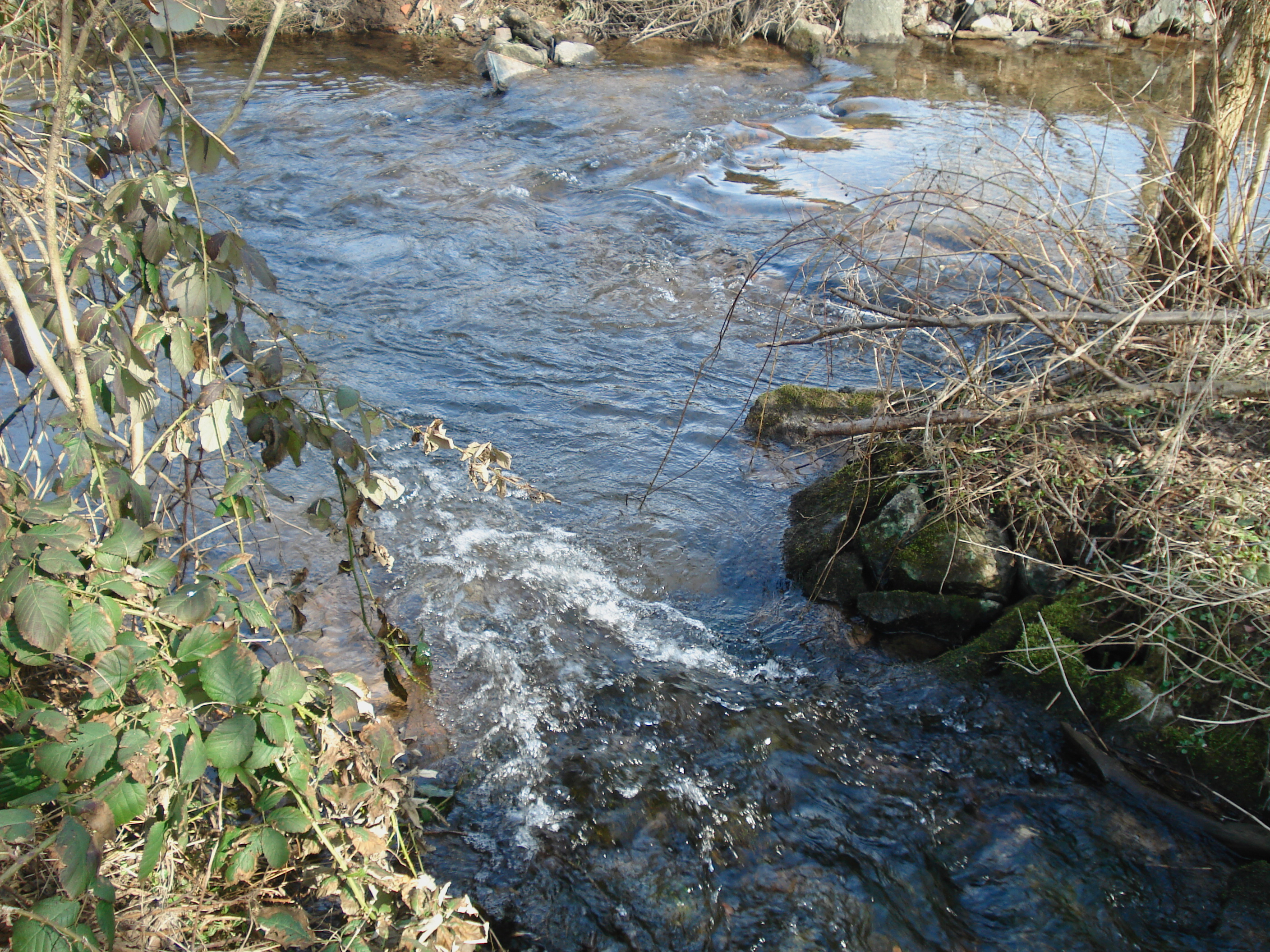 Der Laudenbach mündet in Kleinlaudenbach die Kahl